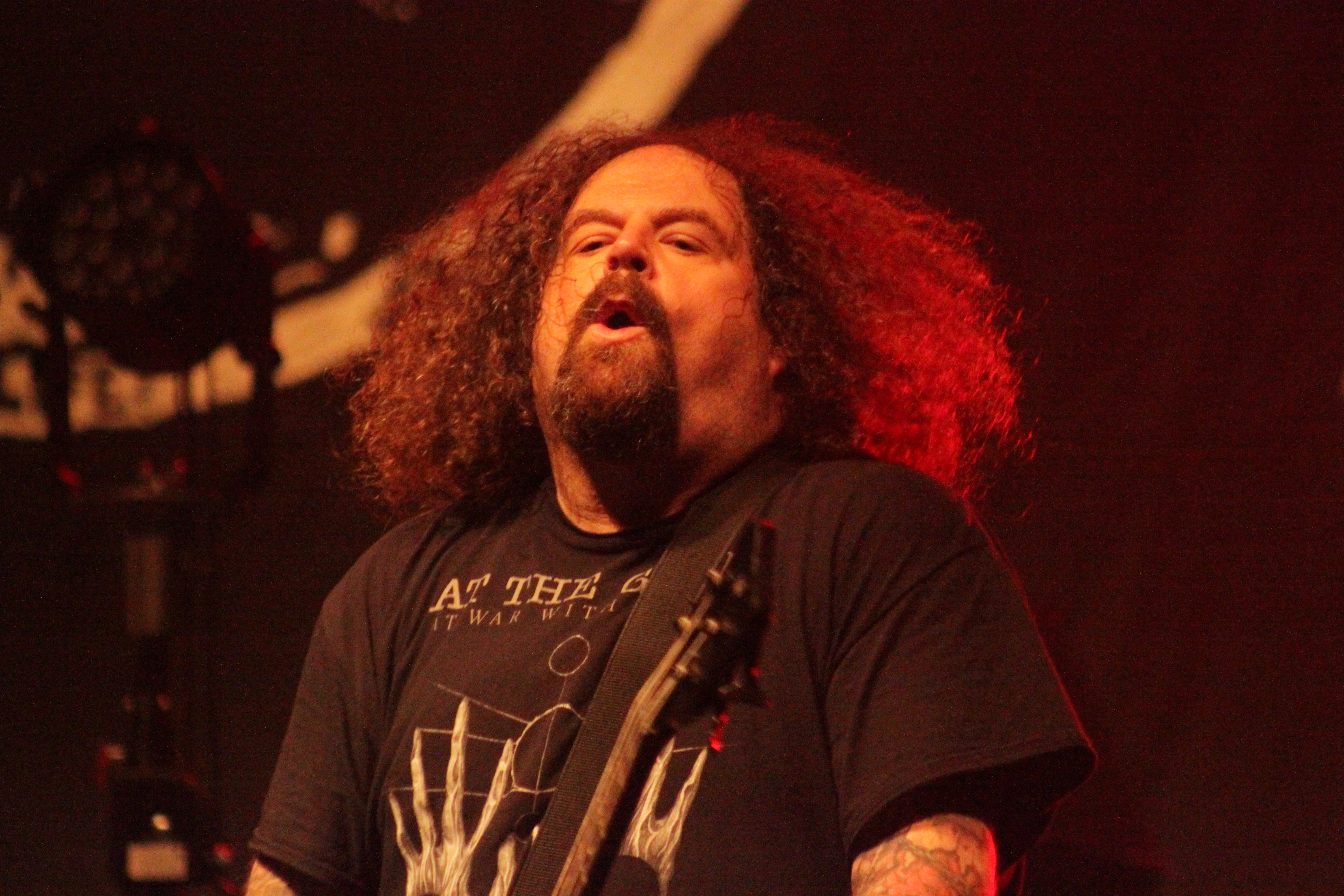 Shane Embury, Napalm Death au Muscadeath XV, Fr-44-Vallet